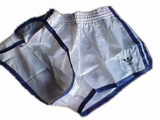 Schritt 2: Freistellen des Hintergrunds mit Zauberstab